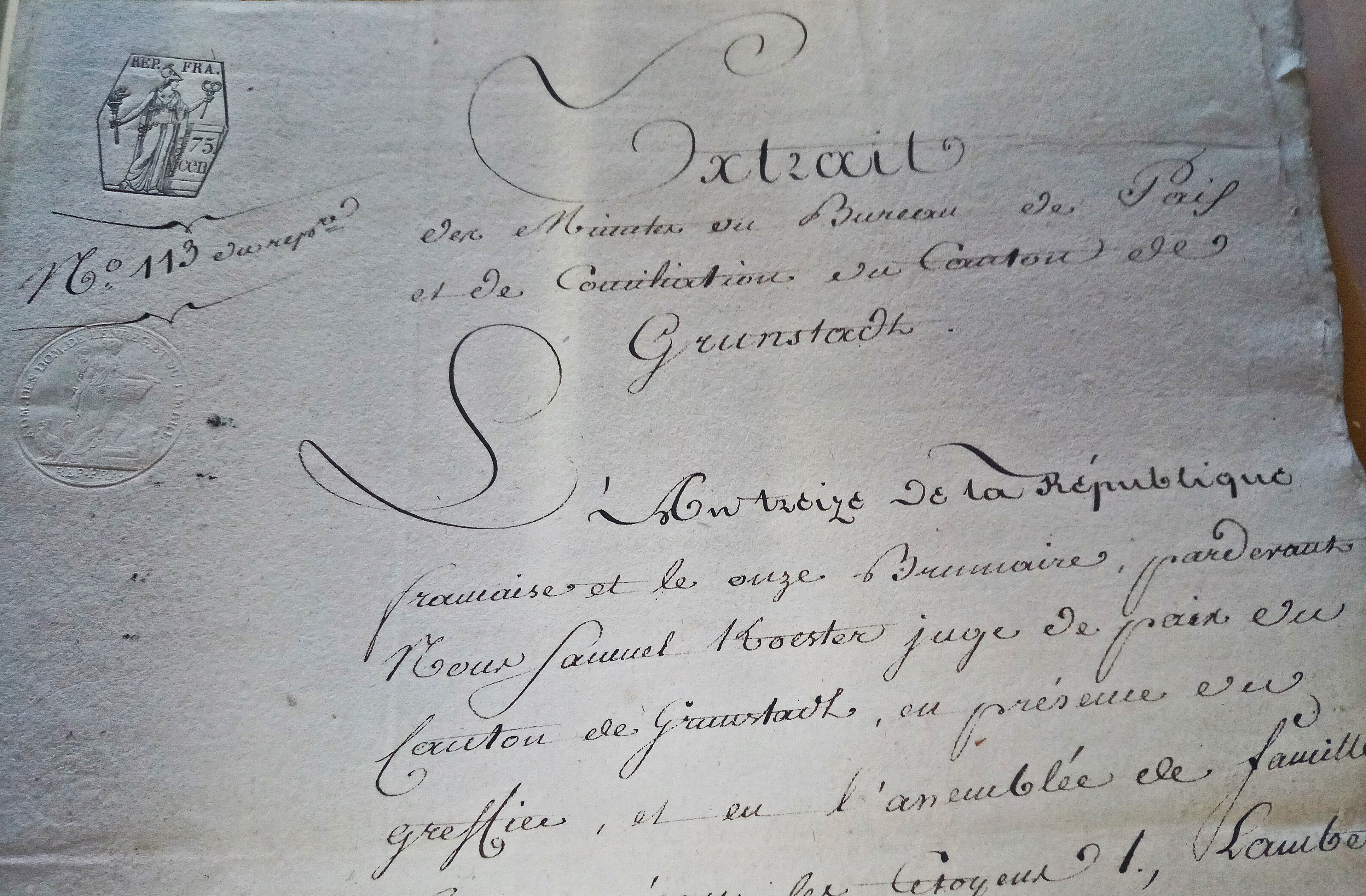 Urkunde des Friedensrichters Samuel Köster, Kanton Grünstadt, 1805